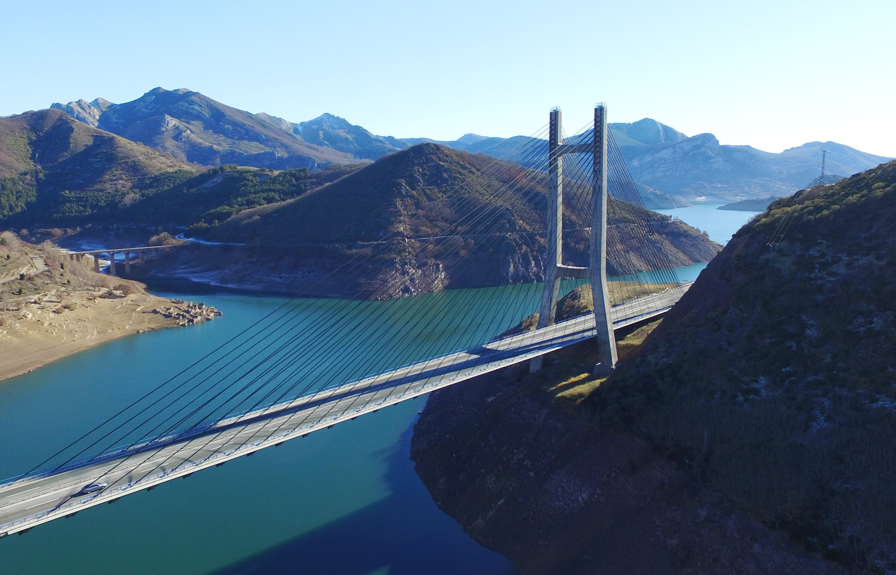 Vista de pájaro del puente Carlos Fernández Casado